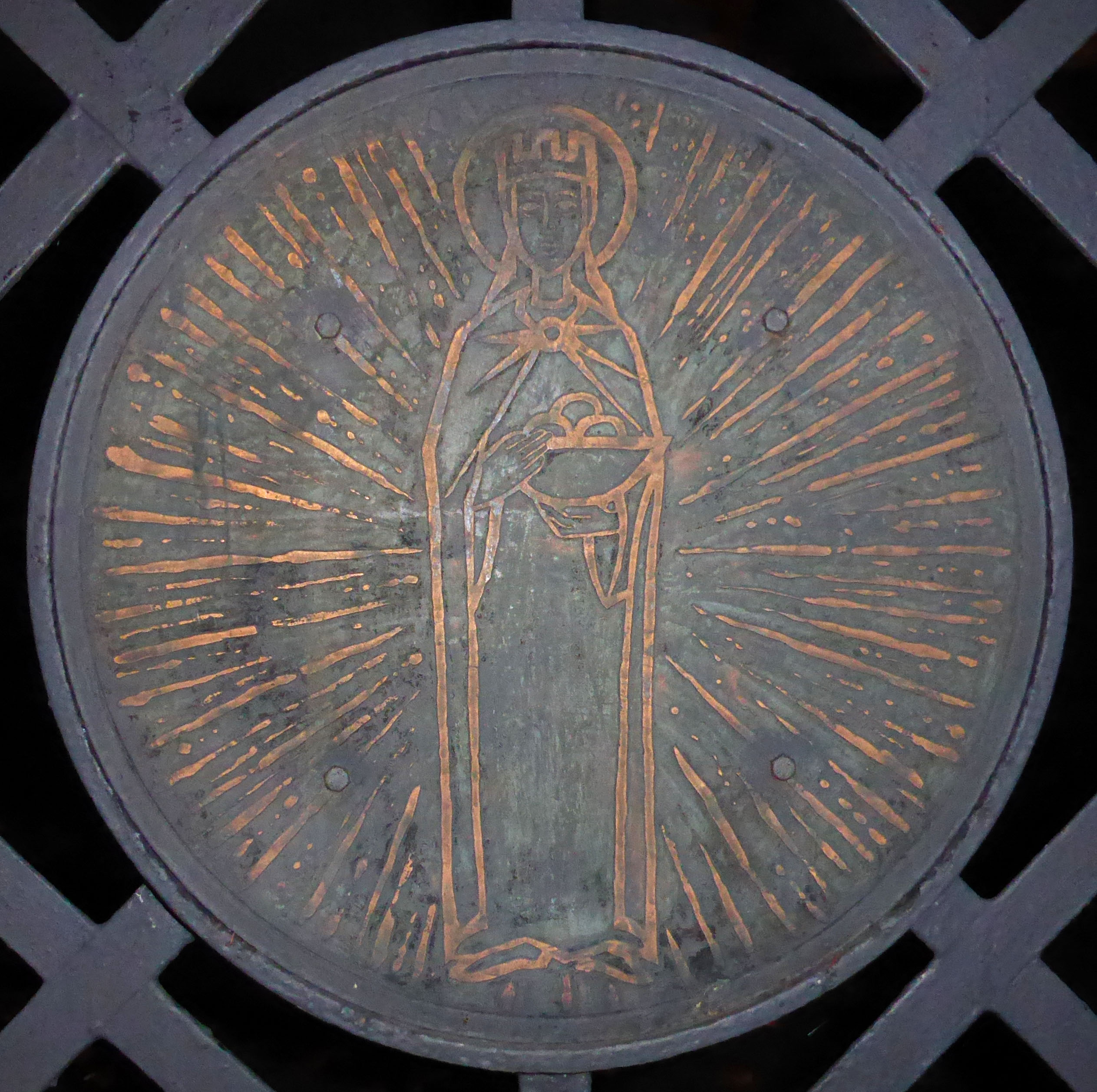 Darstellung der Hl. Elisabeth am Eingangstor der St.-Elisabeth-Kirche in Tangerhütte.